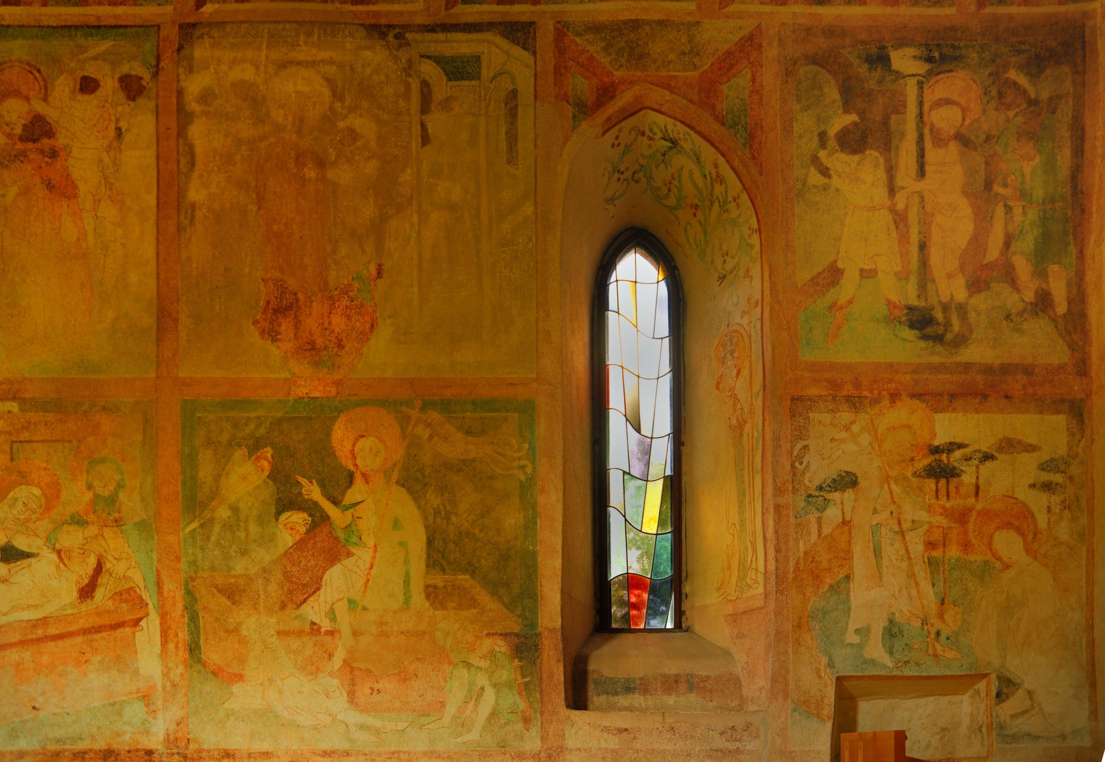 Peterskirche Blansingen: Bilderzyklus der Nordwand (Obere Reihe: Judaskuss, Christus vor Kaiphas, Geißelung, untere Reihe: Grablegung, Auferstehung, noli tangere)